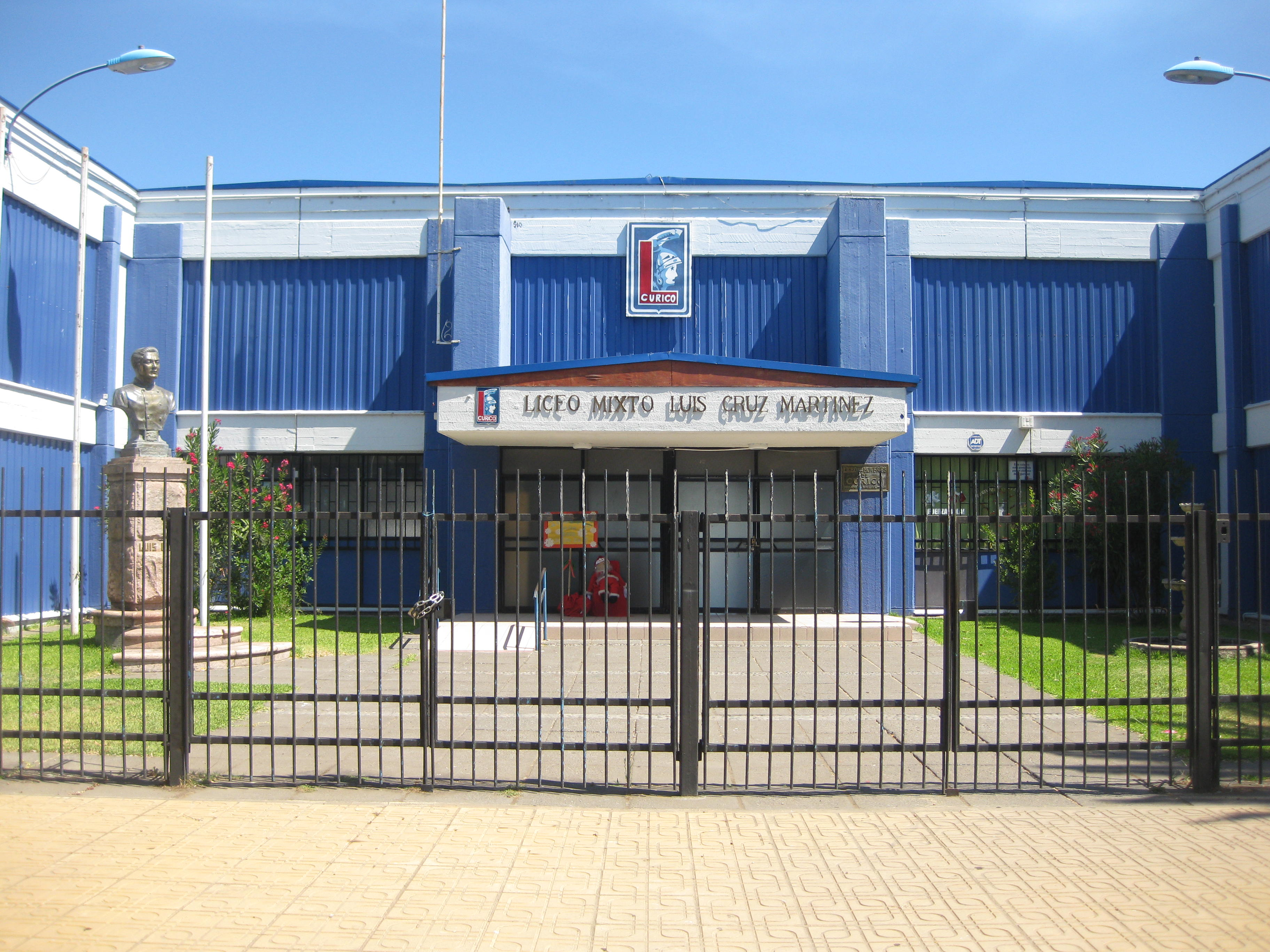 Entrada del Liceo Luis Cruz Martínez de Curicó.